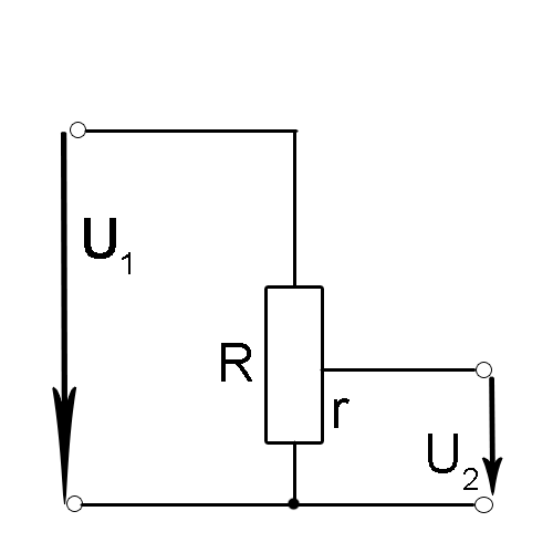 schema potenciometra